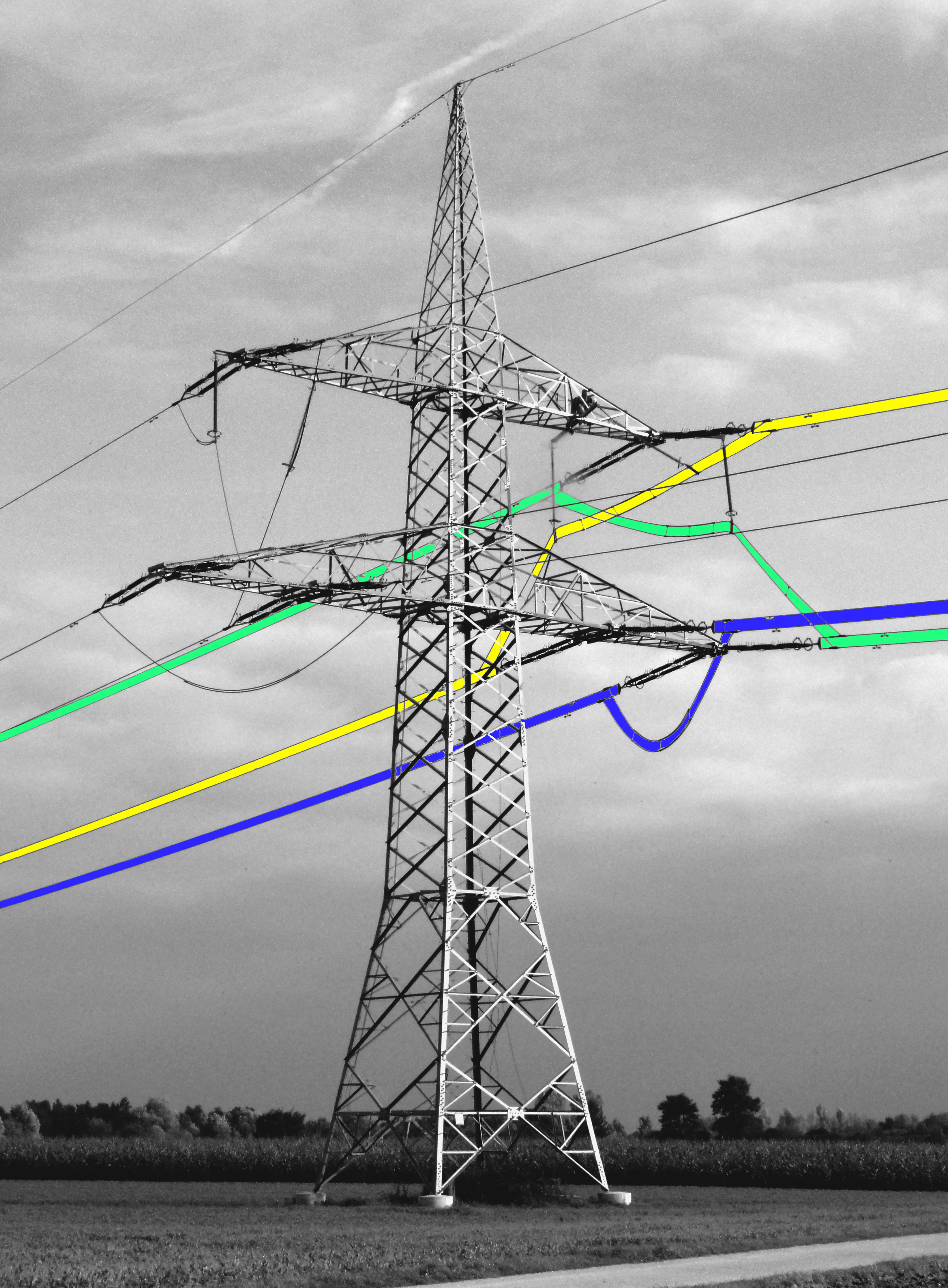 Verdrillmast der Höchstspannungsleitung Schwandorf–Pleinting bei Kirchroth; mit farblicher Kennzeichnung der Phasen der Leiterseile (nur für die einkreisige 380-kV-Drehstomleitung; an normalen Abspannmasten werden die Leiterschleifen unter den Isolatoren durchgeführt und so die elektrische Verbindung der Leiterseile rechts und links der Traverse hergestellt. Bei dem gezeigten Verdrill-Mast werden durch Leiterschleifen, die kreuzen oder von unten nach oben geführt werden, die Phasenzuordnung auf die Leiterseile verändert und so die Verdrillung durchgeführt. Auch die parallel geführte 220-kV-Drehstromleitung wird an diesem Mast verdrillt; sie wurde aber nicht farblich gekennzeichent